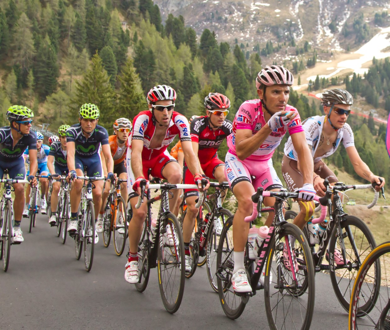 072 pampeago rodriguez met puffertje